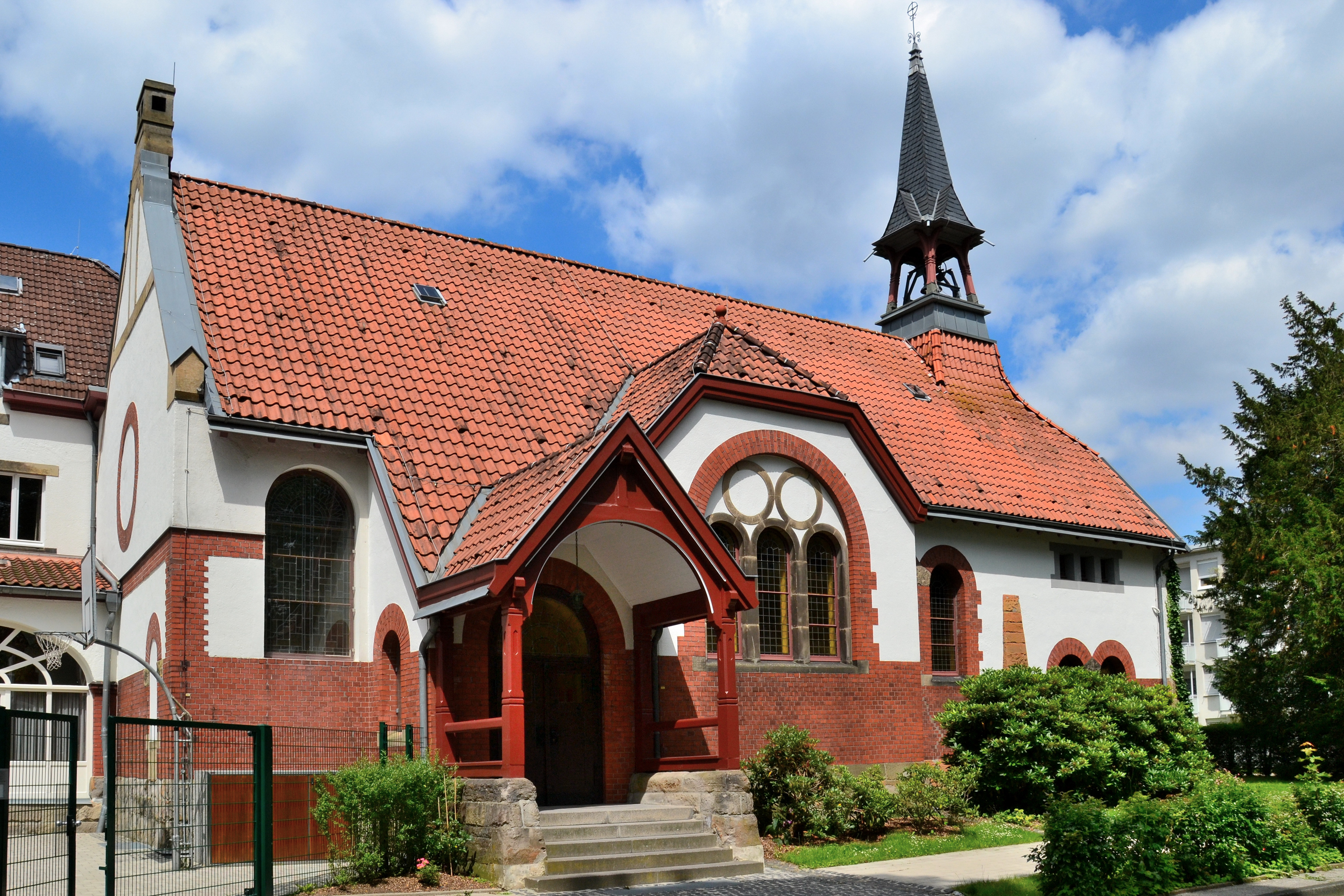 Ev. Kirche in Essen-Bredeney (Am Brandenbusch), unter Denkmalschutz